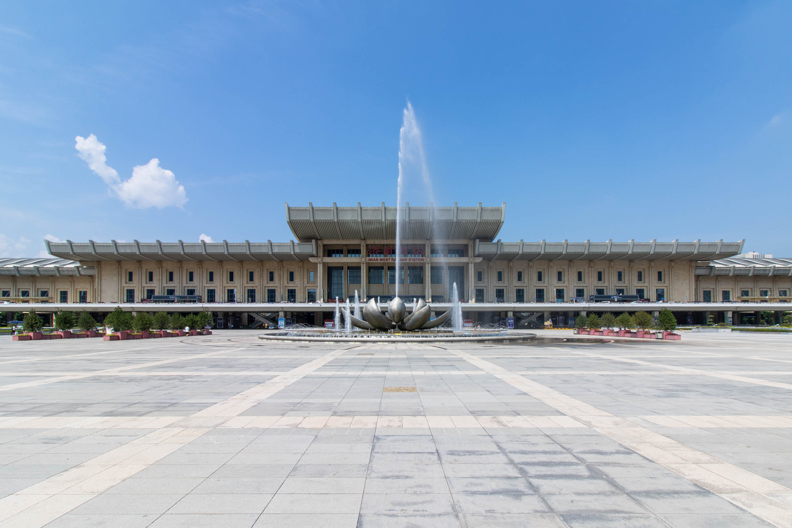 中文（中国大陆）: 济南西站东广场